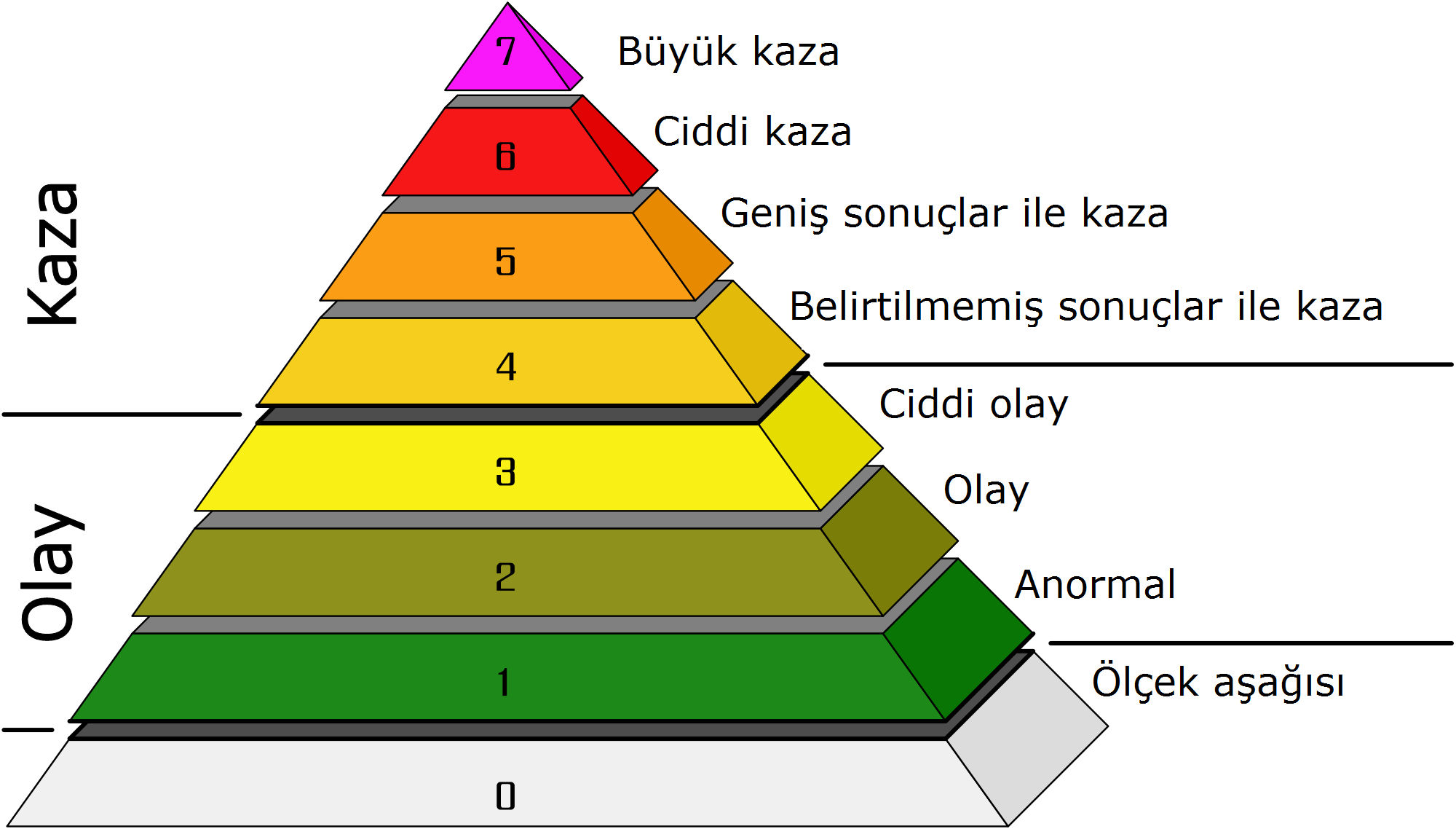 Uluslararası Nükleer Olay Ölçeği